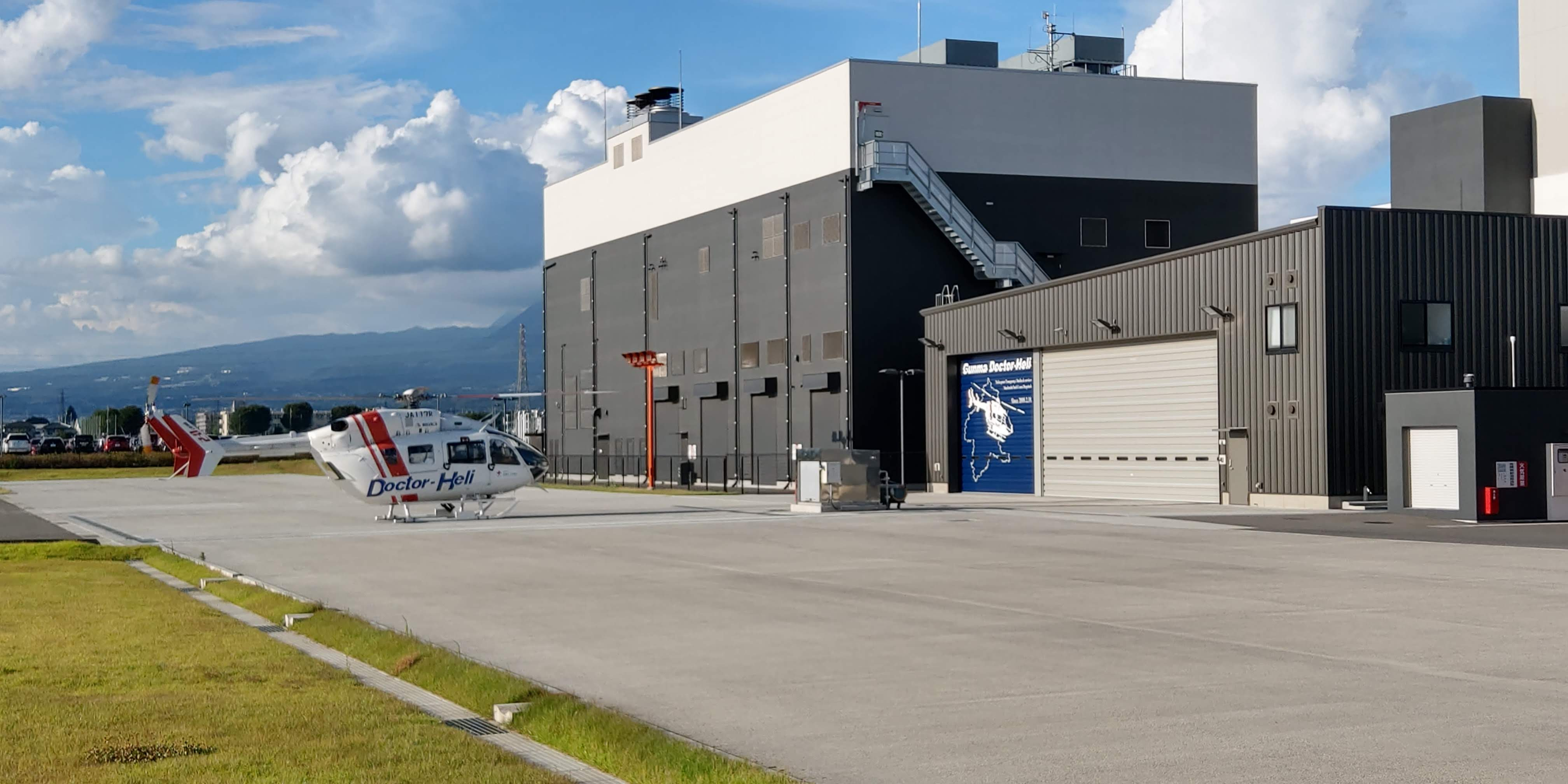 群馬県ドクターヘリと前橋赤十字病院に設置された格納庫